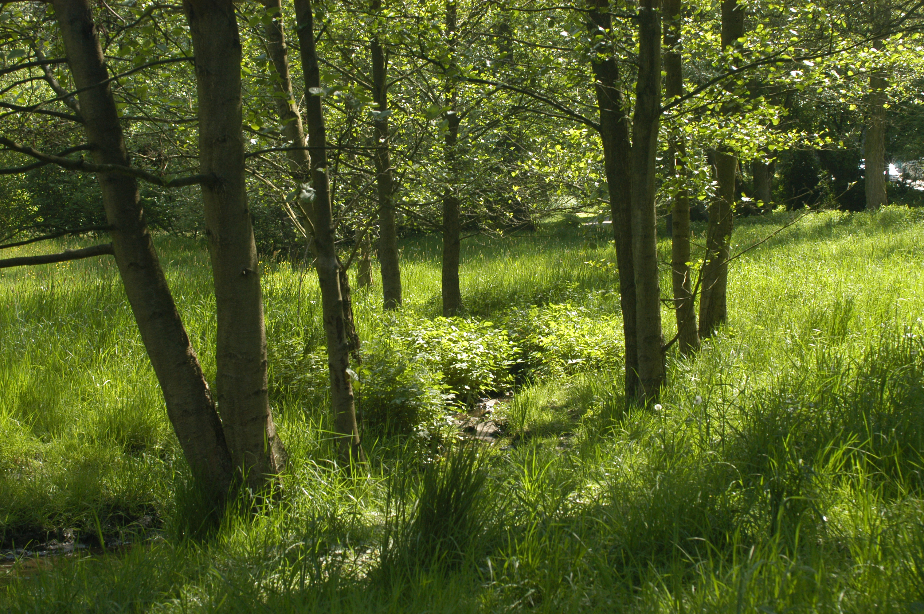 Renaturierter Marbach im Bochumer Wiesental